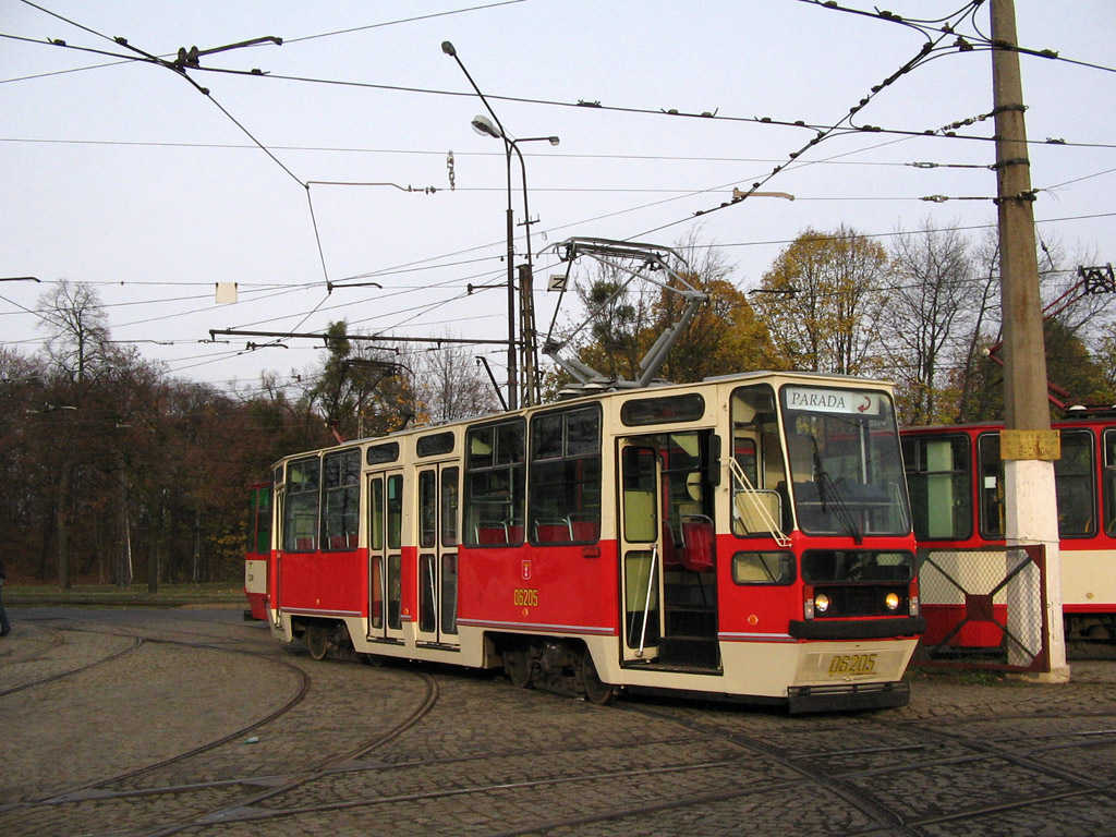 Konstal 105N in Wrzeszcz, Gdańsk, Poland. Przywrócony do pierwotnej postaci wagon 105N w zajezdni Strzyża w Gdańsku.